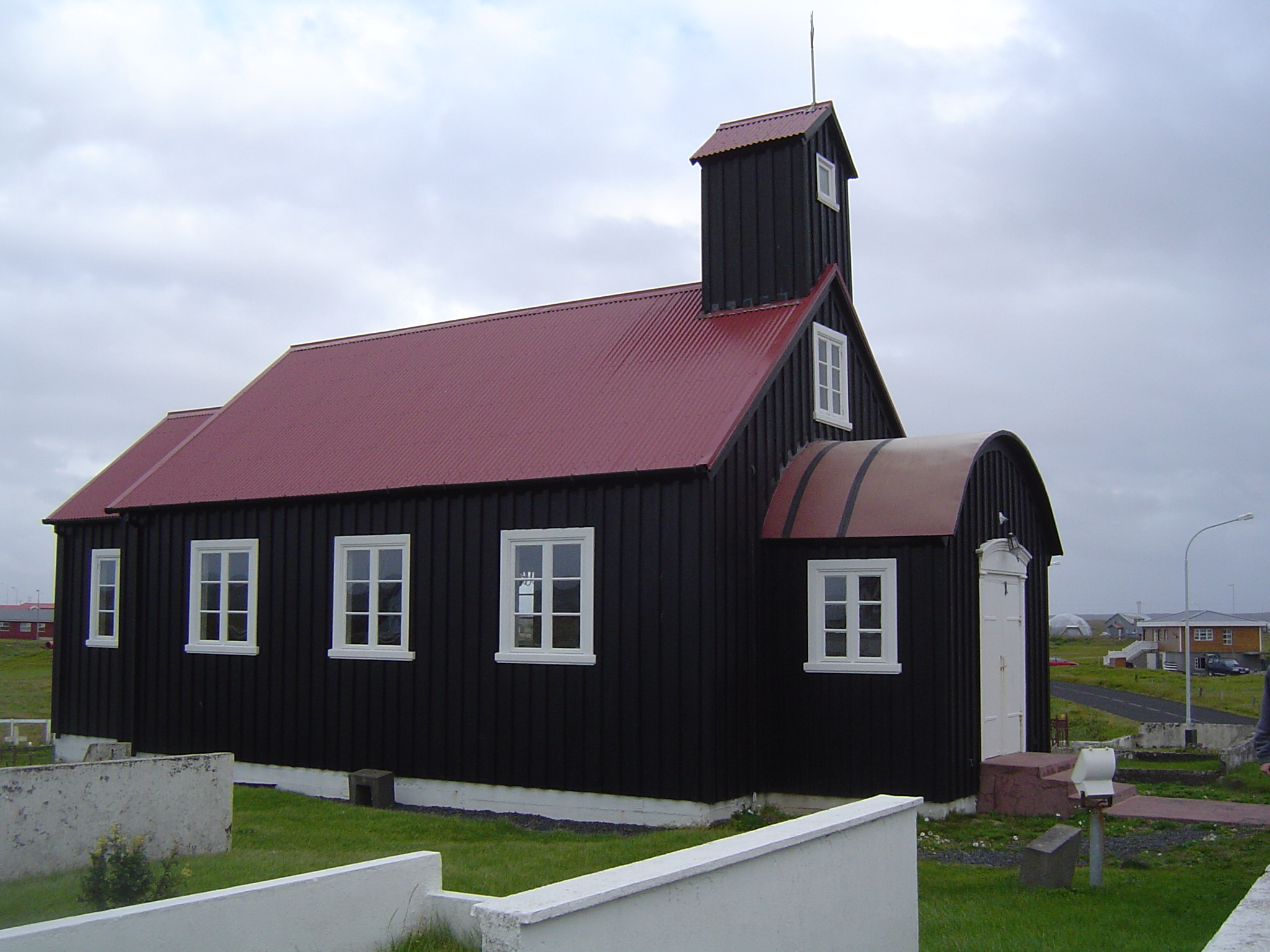 Kirkjuvogskirkja, Church of Hafnir, Reykjanesbær, Iceland